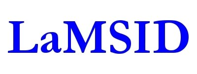 Logo du LaMSID - Laboratoire de Mécanique des Structures Industrielles Durables